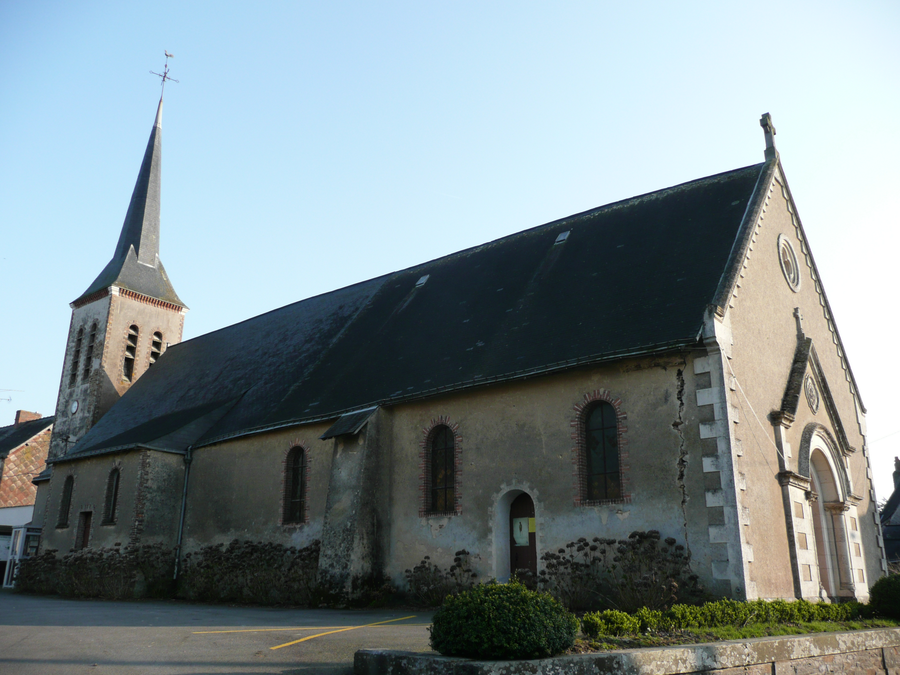 Eglise de la commune de La Prévière